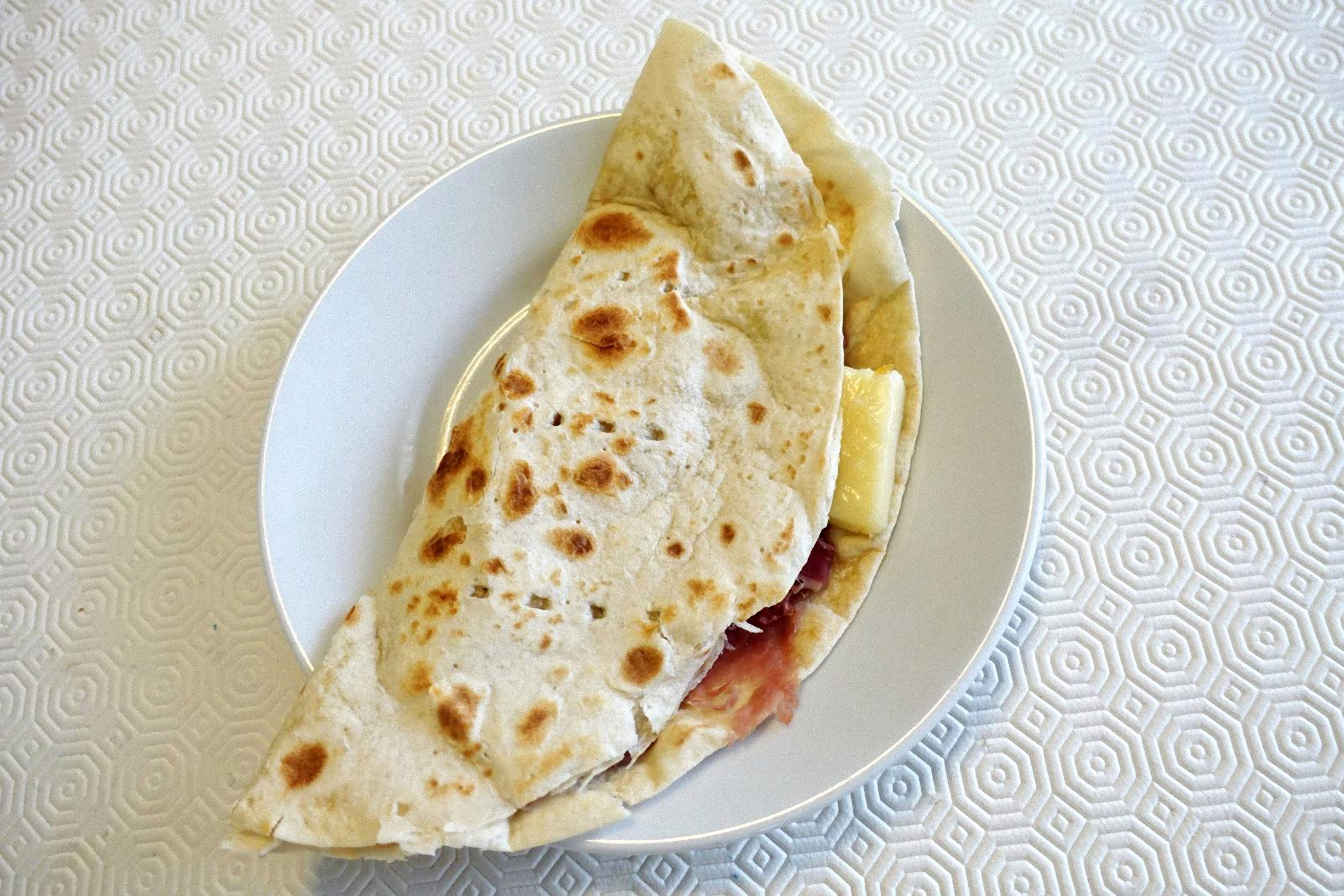 Piadina prosciutto e Asiago DOP